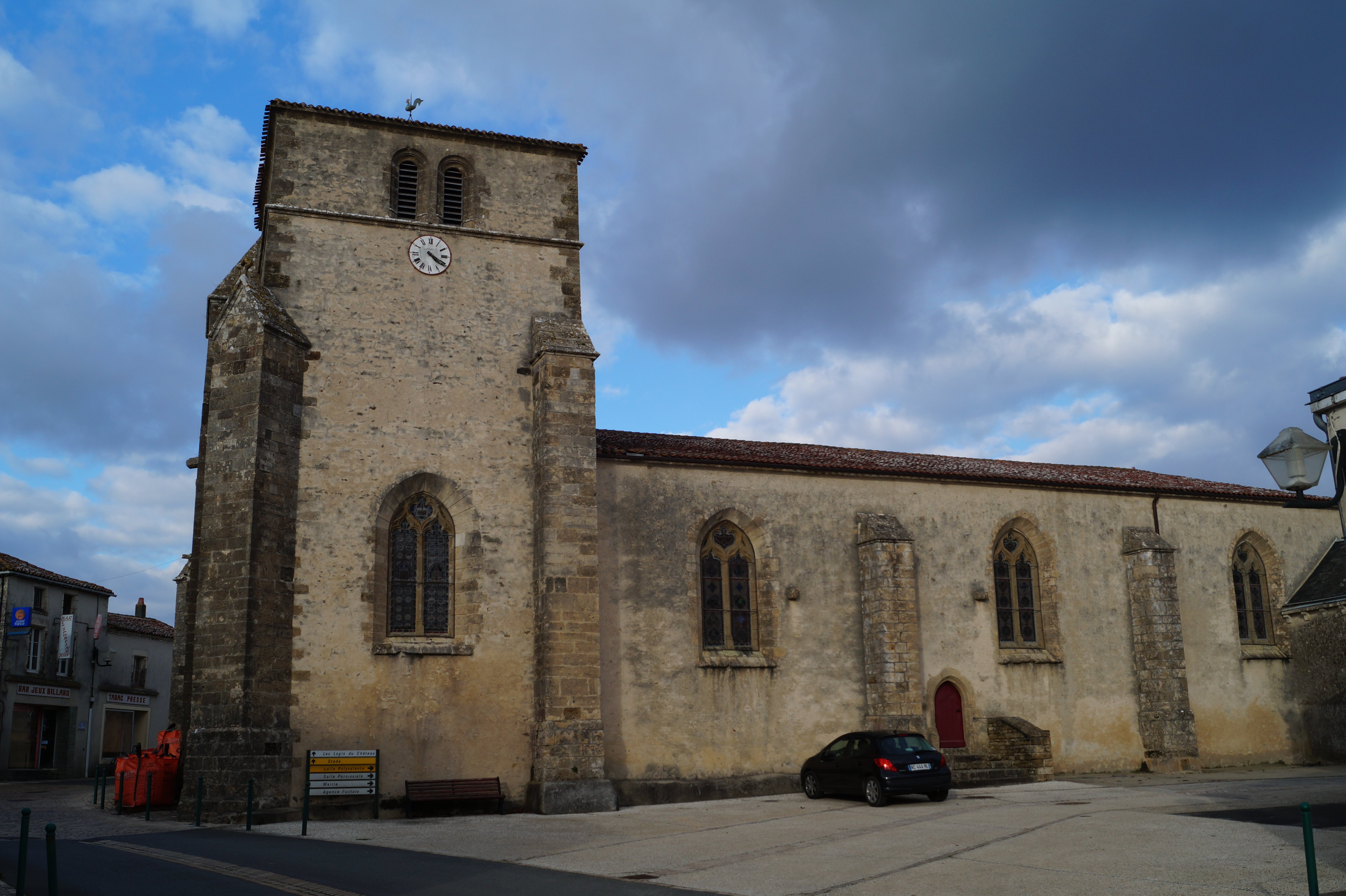 L’église Saint-Jean-Baptiste de Bourneau.